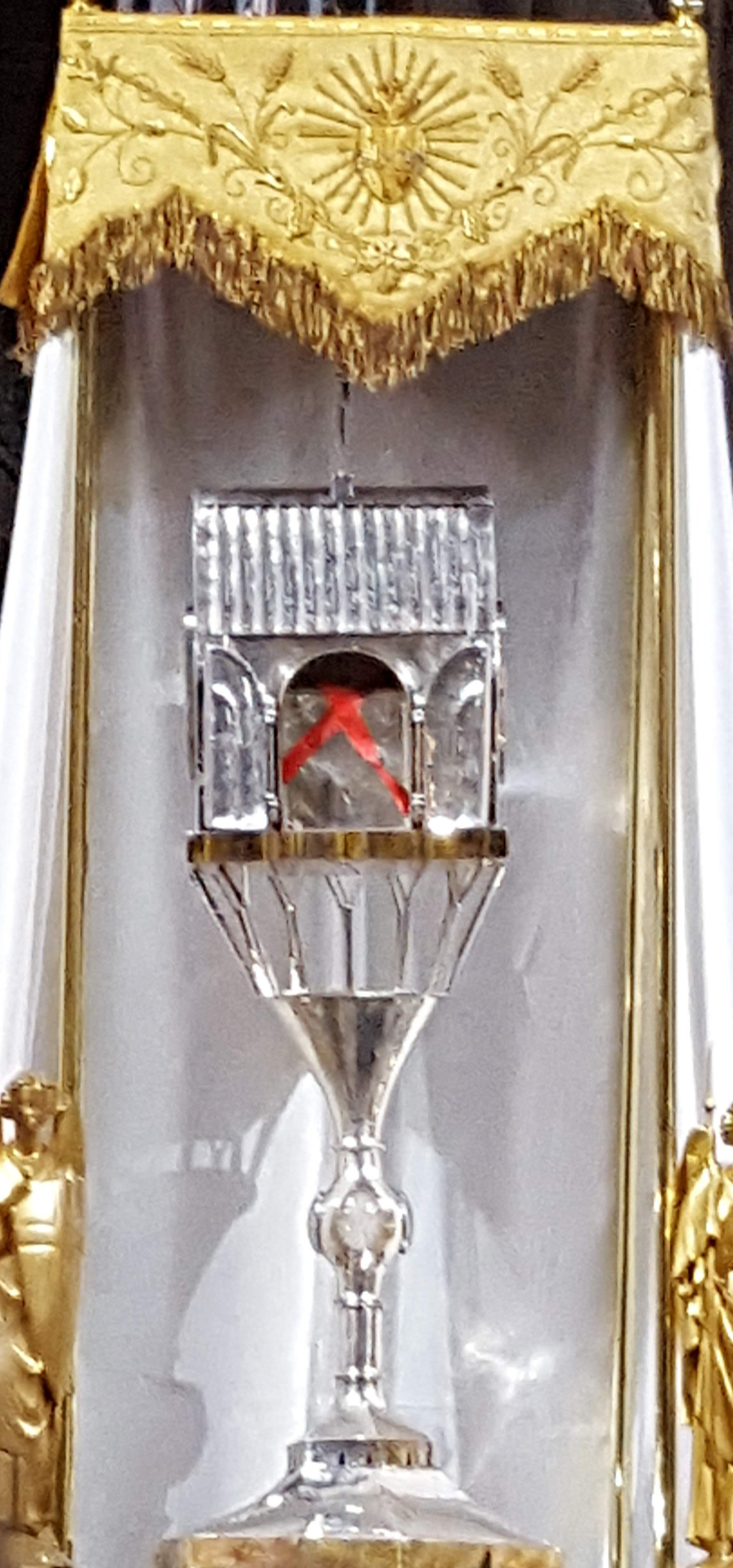 Reliquaire du Coeur du Padre Pio lors de son ostension à Notre-Dame de Paris le 19 mai 2018